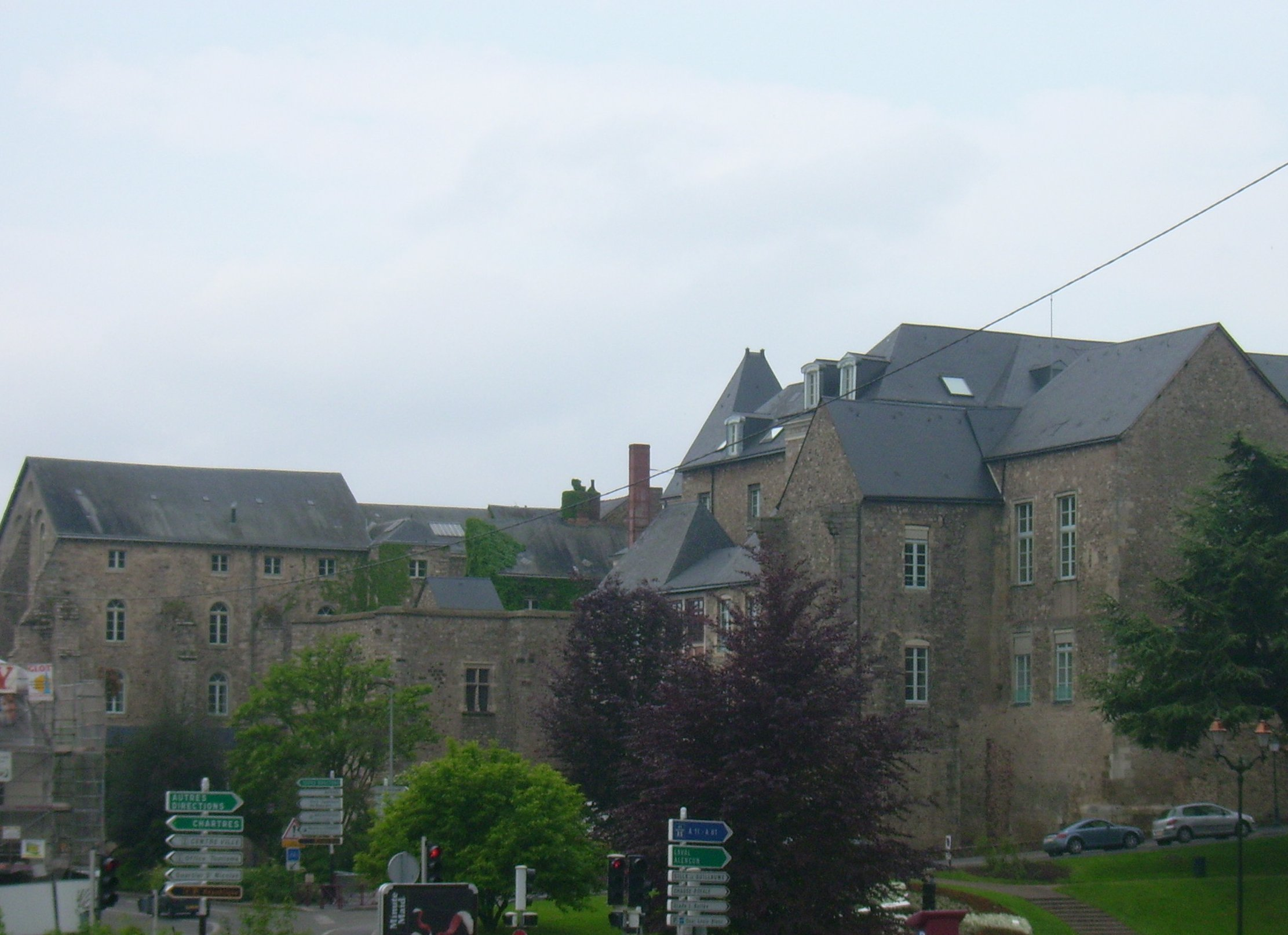 Palais des Comtes du Maine actuellement Hotel de ville du Mans